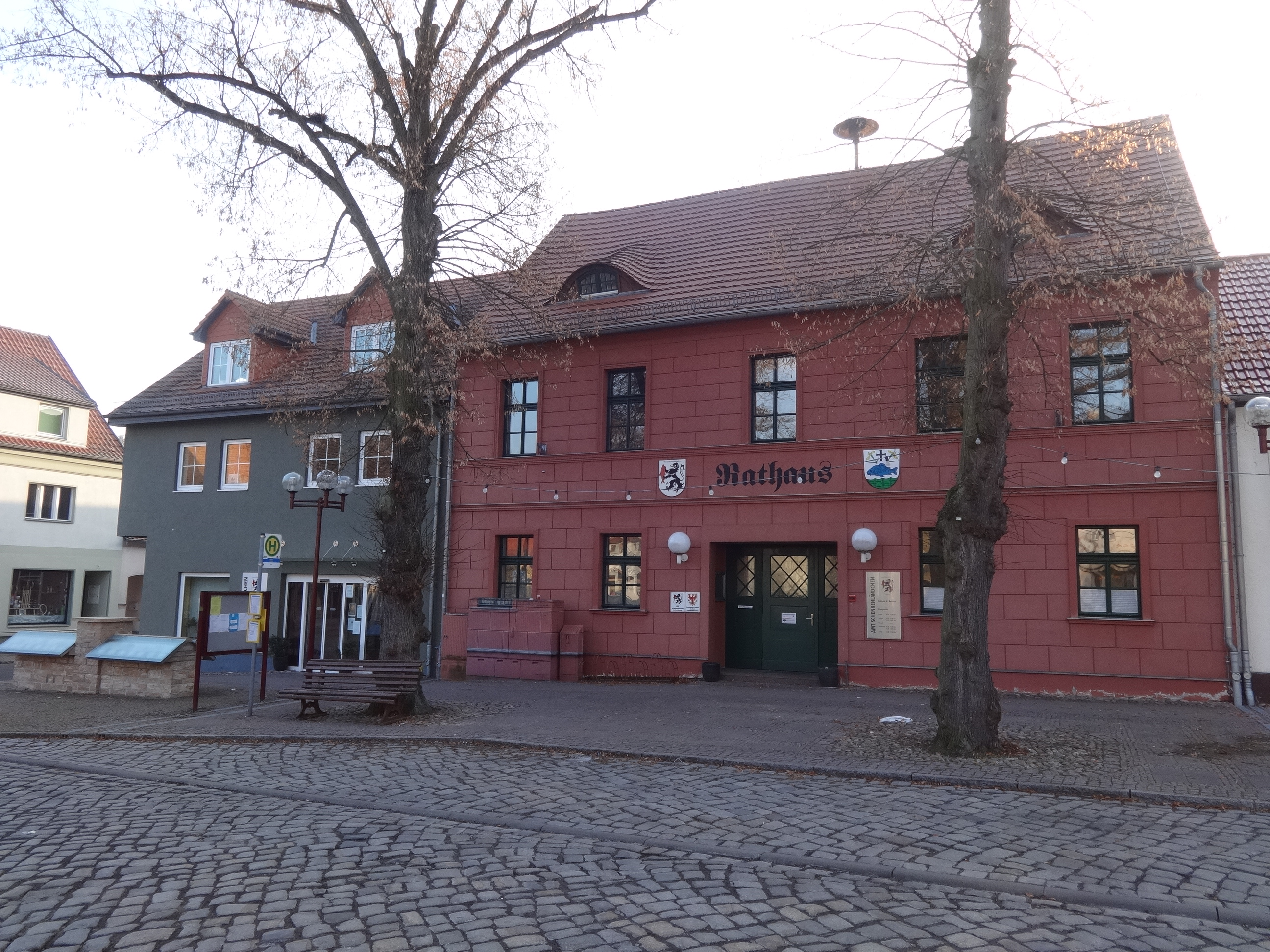 Rathaus mit Seitengebäude, Markt 9, in Teupitz